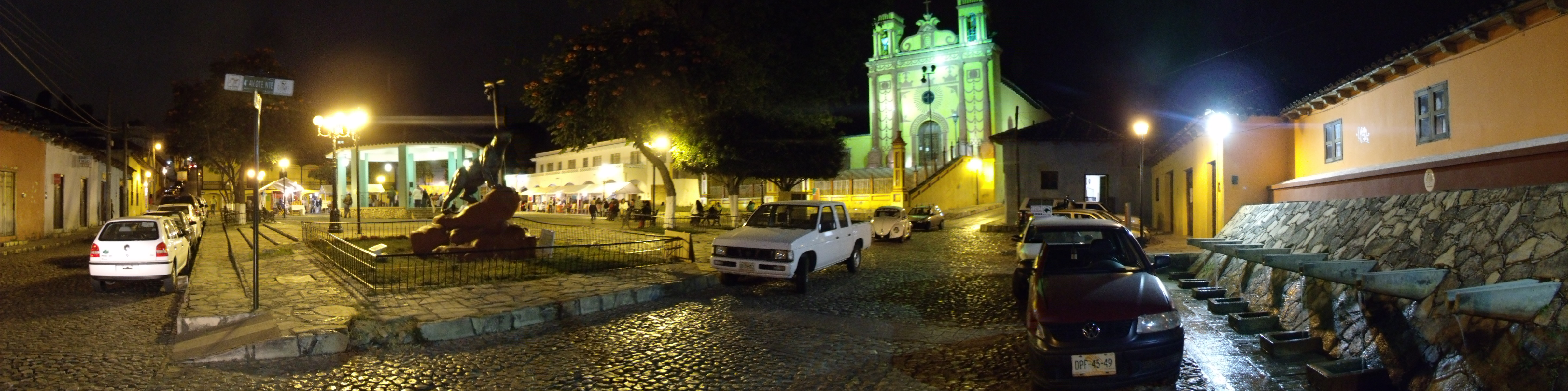 parque e iglesia a san Caralampio, el barrio mas antigüo de la ciudad, en el mismo lugar que los mayas fundaron prehispanicamente Balum Canan (lugar de las nueve estrellas)